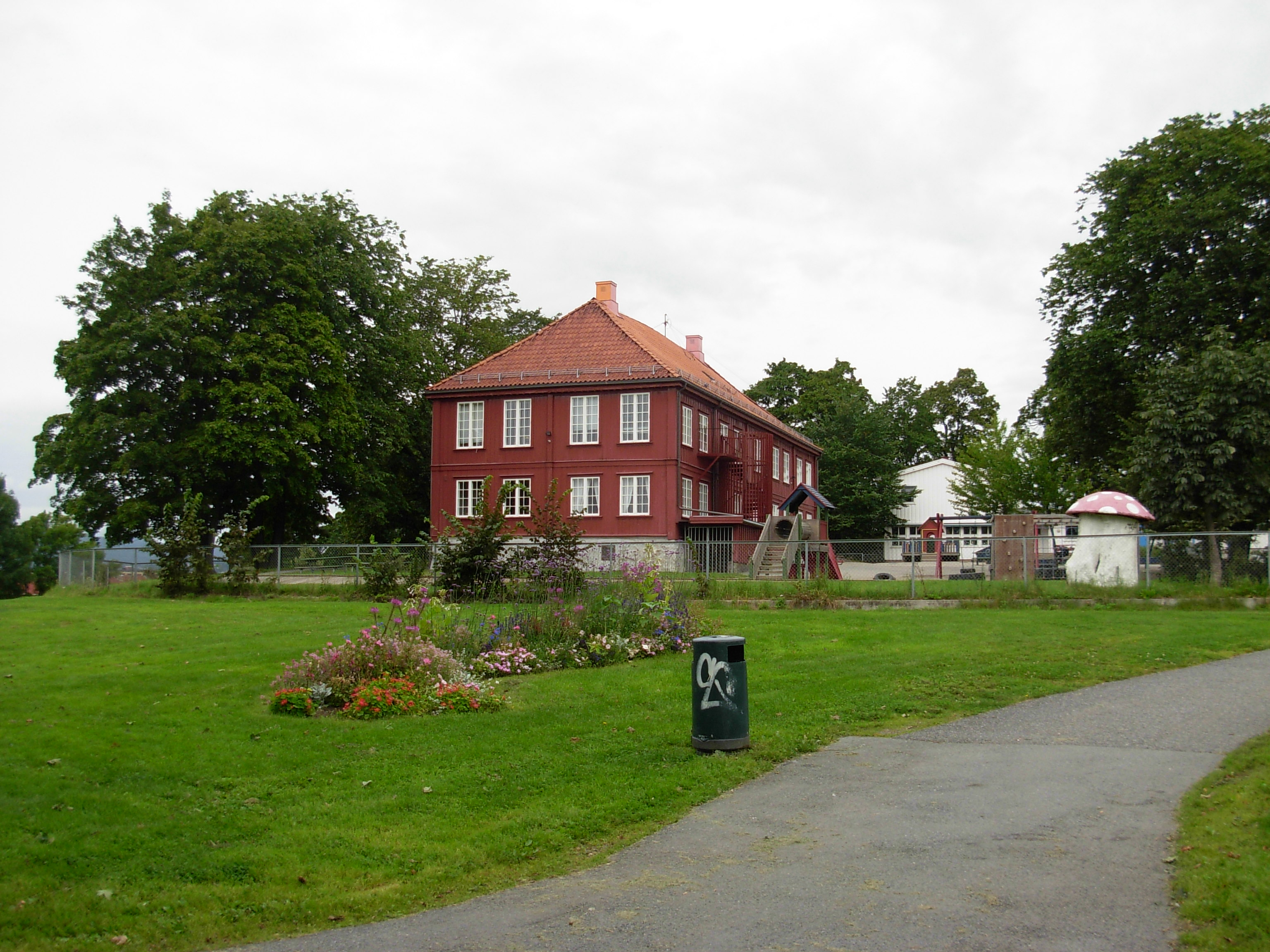 Løkken Bellevue i Tøyenparken